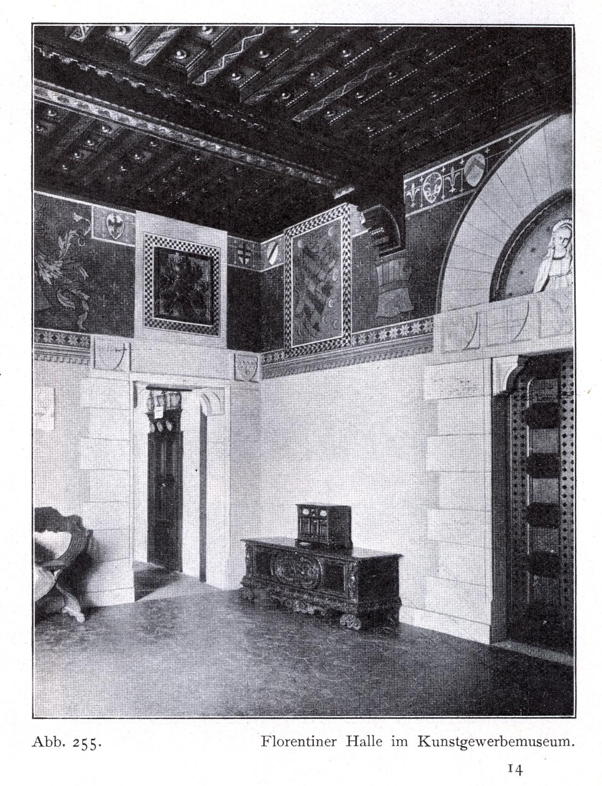 Kunstgewerbemuseum am Friedrichsplatz in Düsseldorf, erbaut 1893 bis 1896, Architekten Carl Hecker und Franz Deckers, Florentiner Halle.jpg